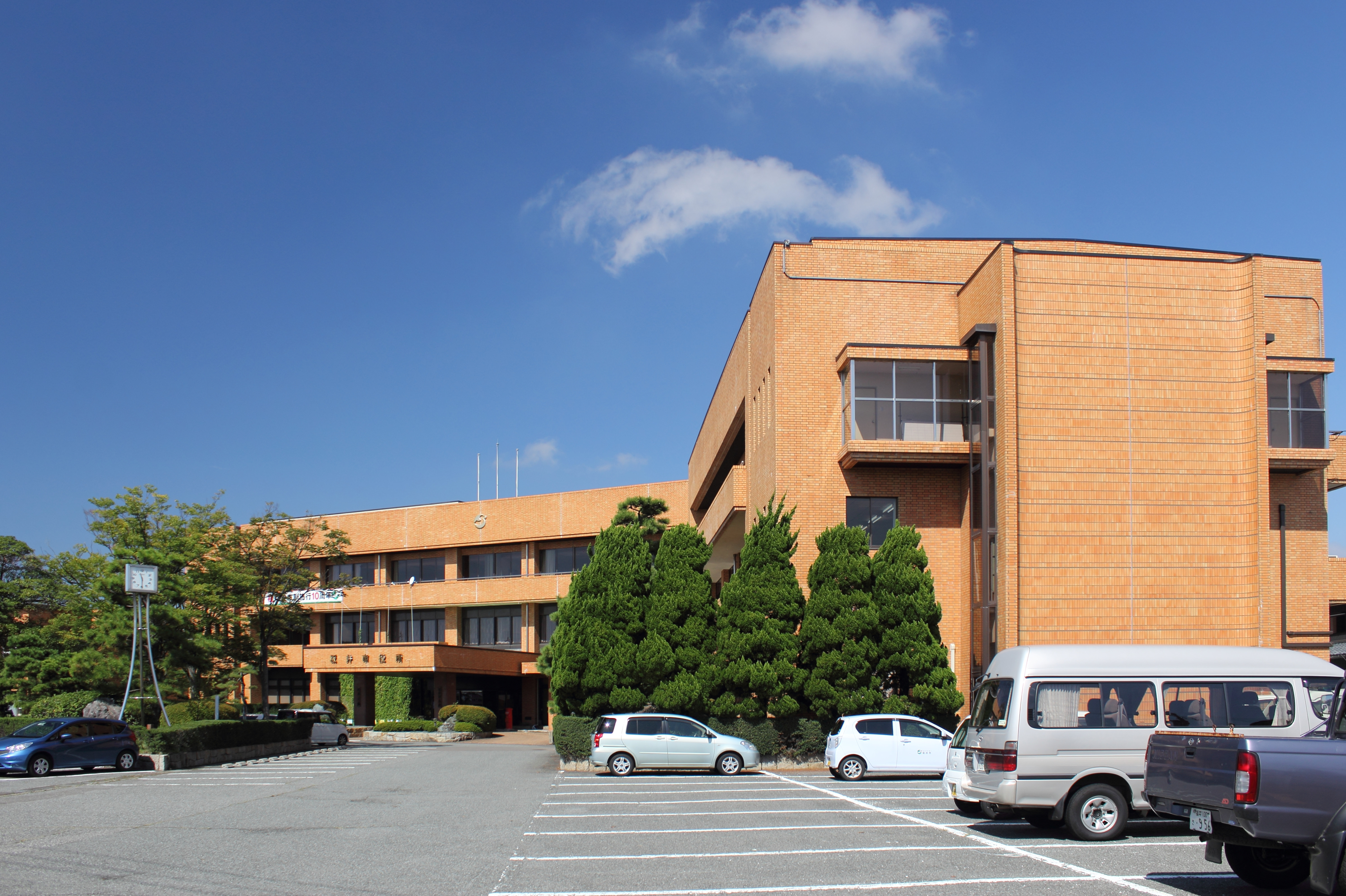 坂井市役所（福井県坂井市）